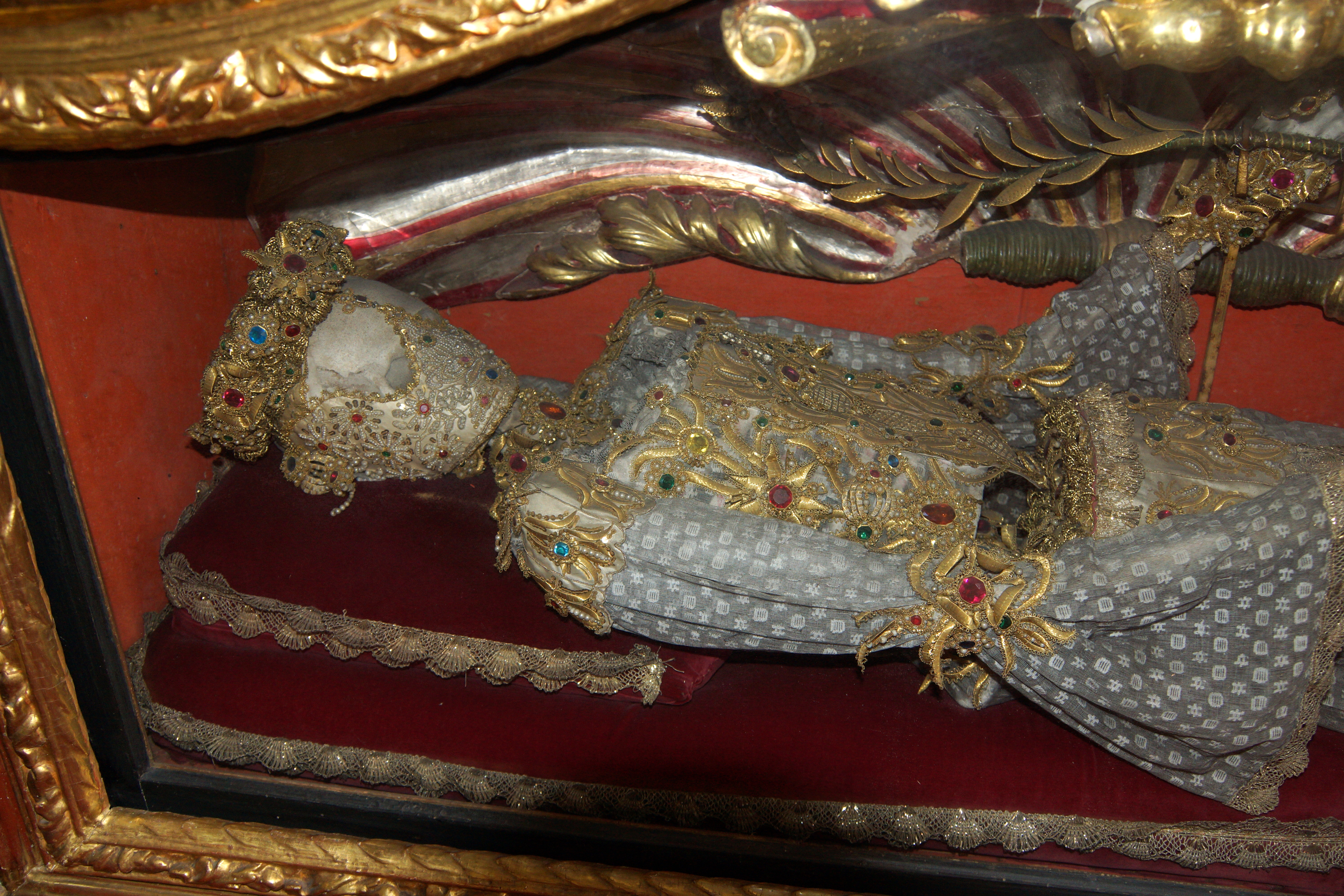 Die Pfarrkirche St. Birgitta in Gnadenberg bei Berg in der Oberpfalz: Reliquienschrein der Hl. Honorata